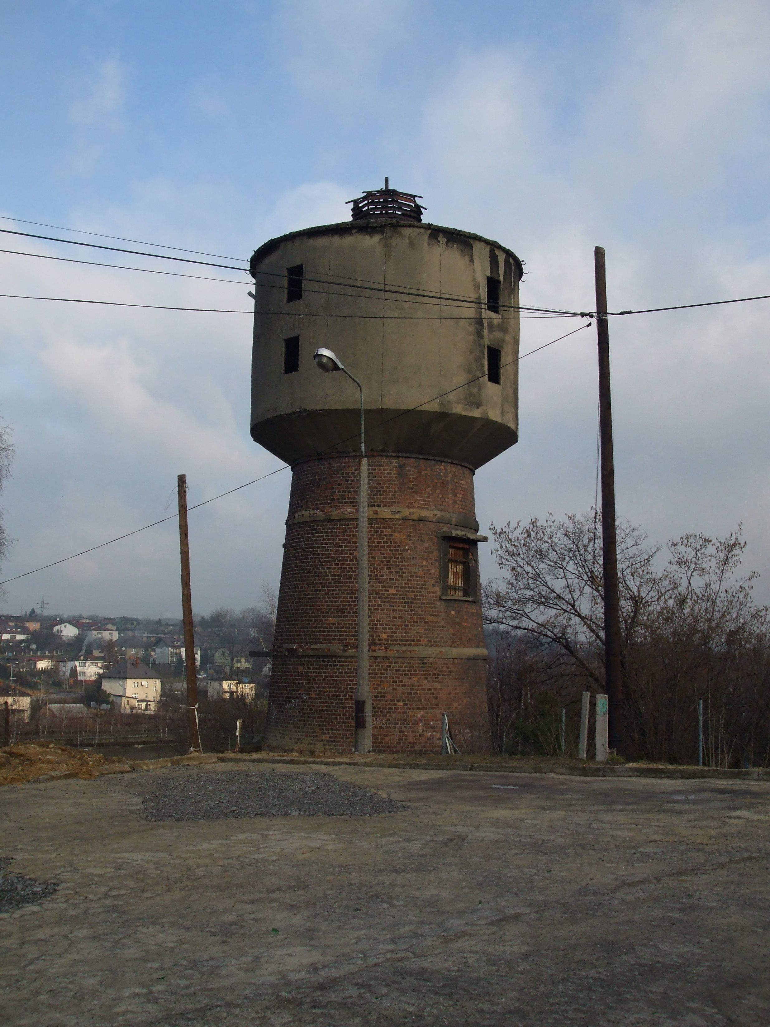 Wieża ciśnień Jastrzębie Zdrój.